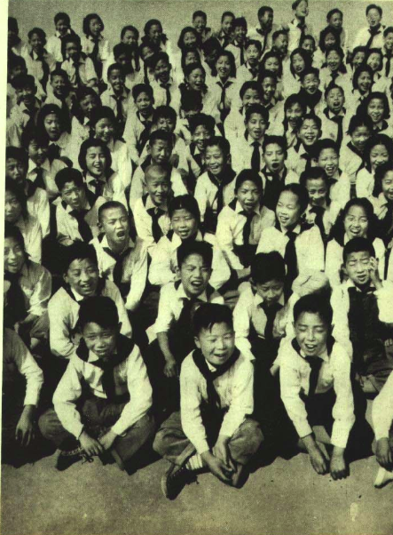 中国第一个国际儿童节，1950年7月的《人民画报》。